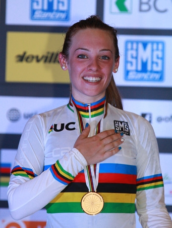 Letizia Paternoster, Junioren-Weltmeisterin im Punktefahren 2014